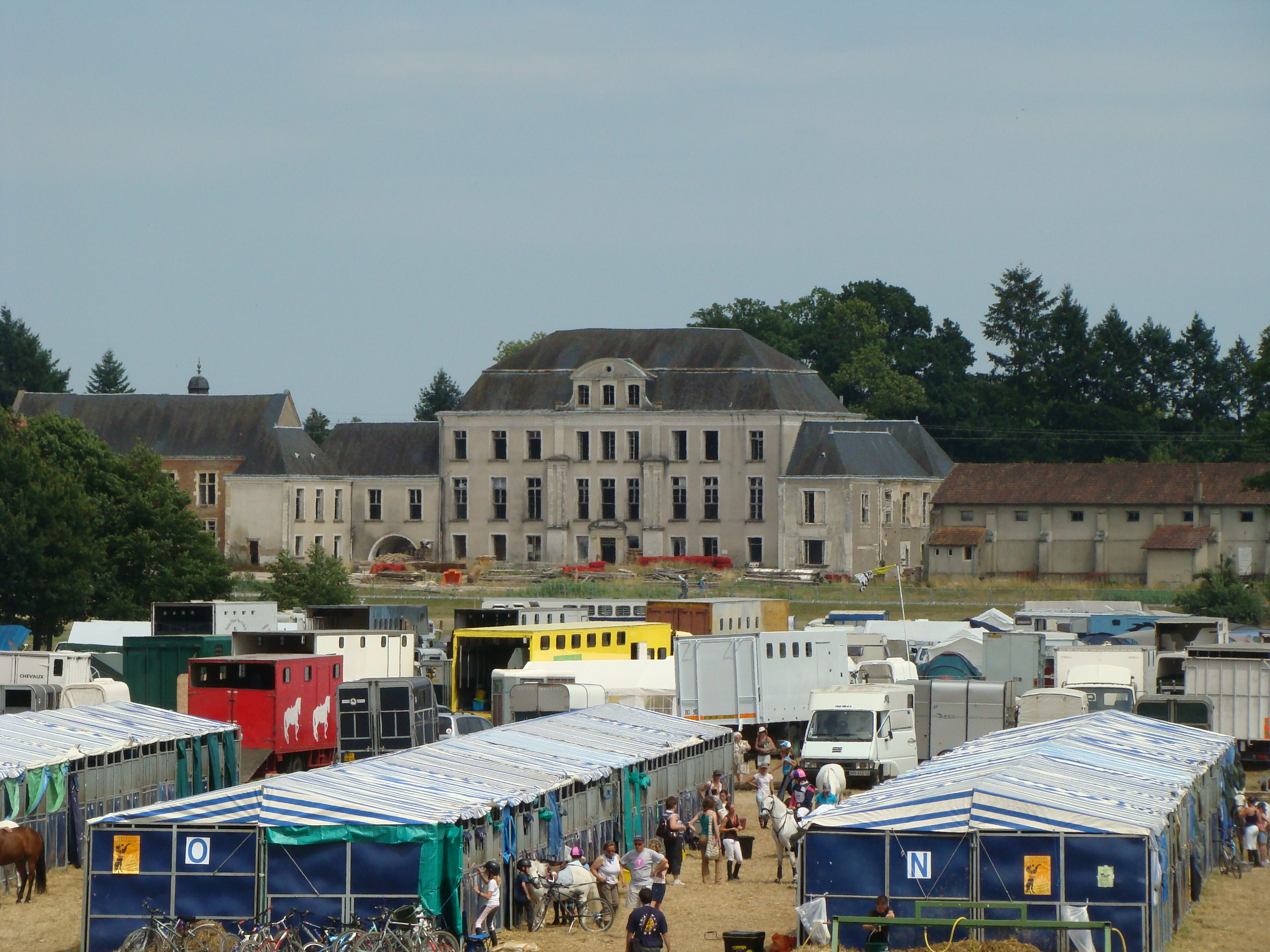 picture taken at 2008 generali opn de france 2008